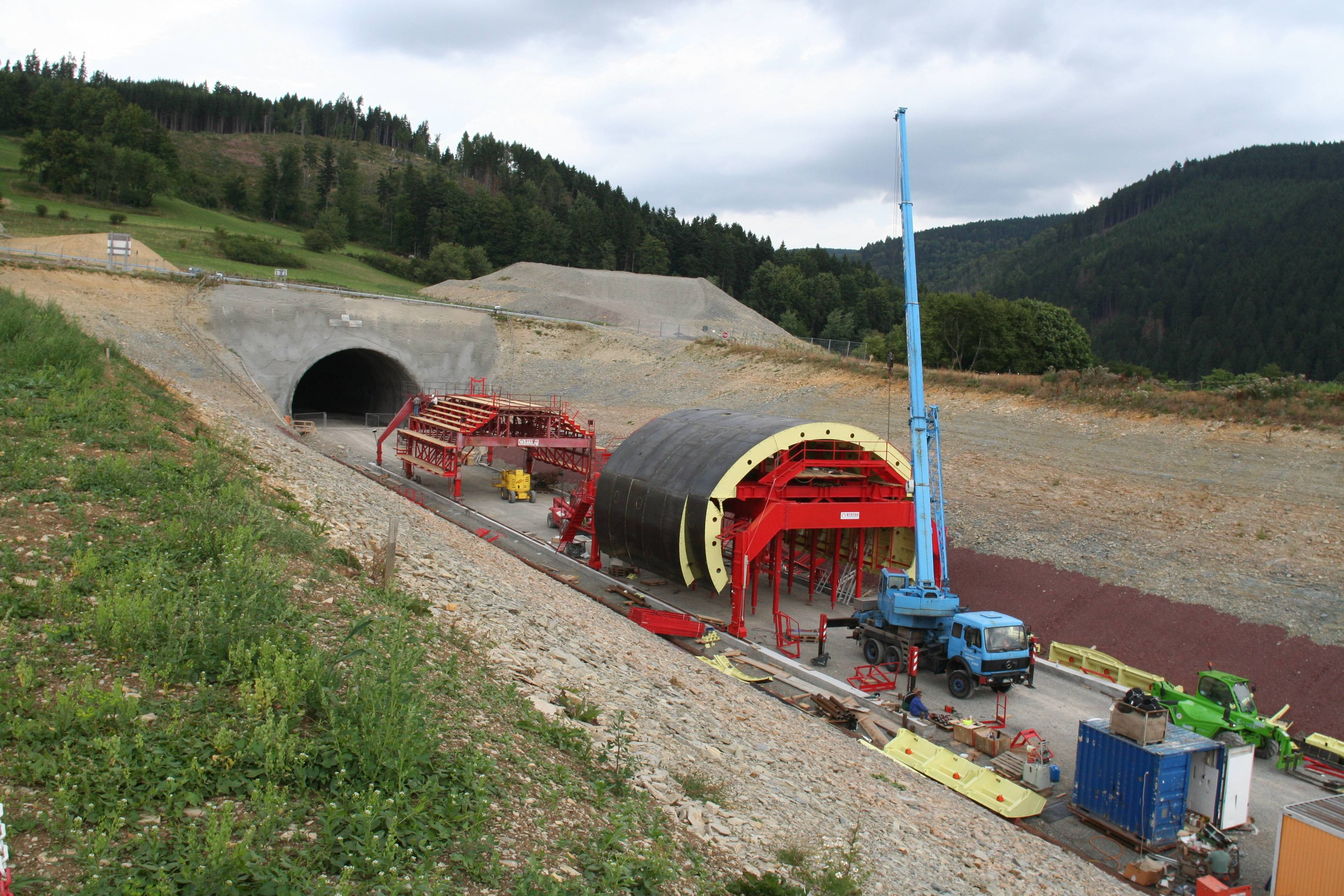 Tunnelportal Süd des Bleßbergtunnels mit Tunnelschalwagen